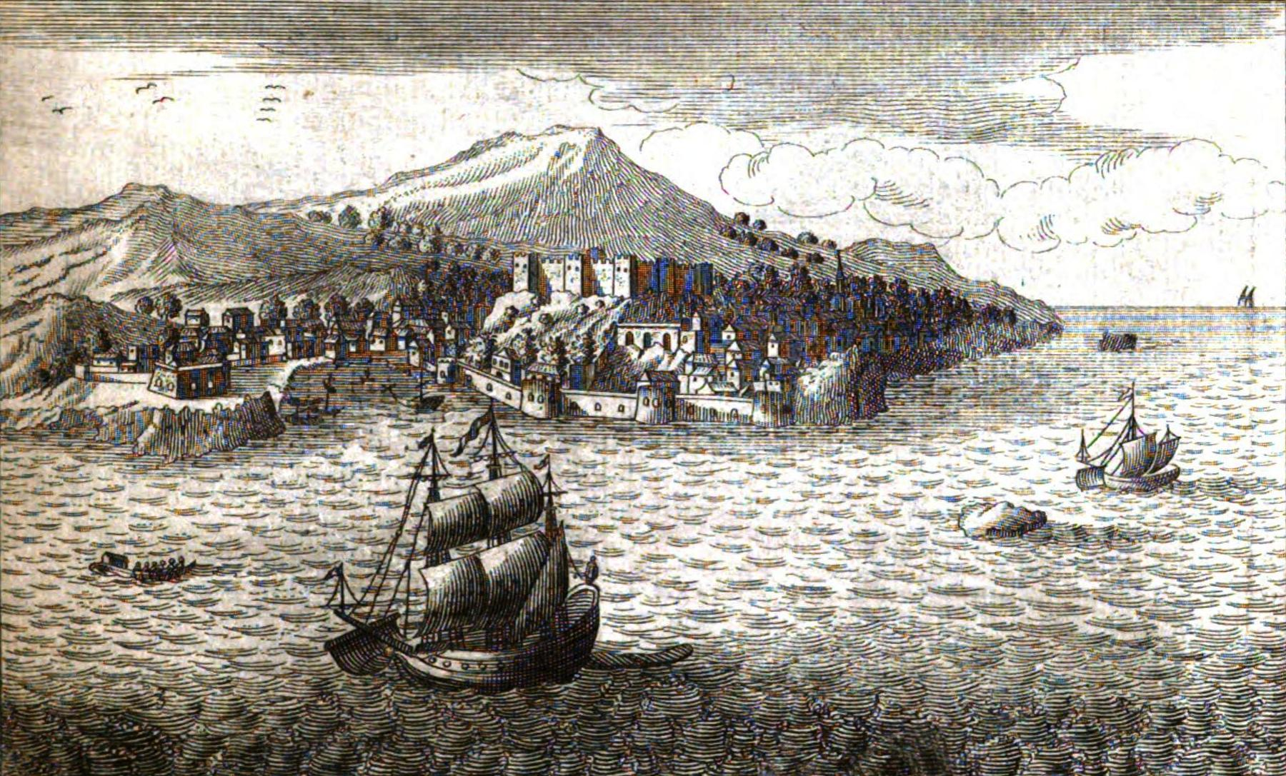 Relation d'un voyage du Levant: fait par ordre du Roi : contenant l'histoire ancienne & moderne de plusieurs isles de l'Archipel, de Constantinople, des Côtes de la Mer Noire, de l'Armenie, de la Georgie, des frontières de Perse & de l'Asie Mineure.